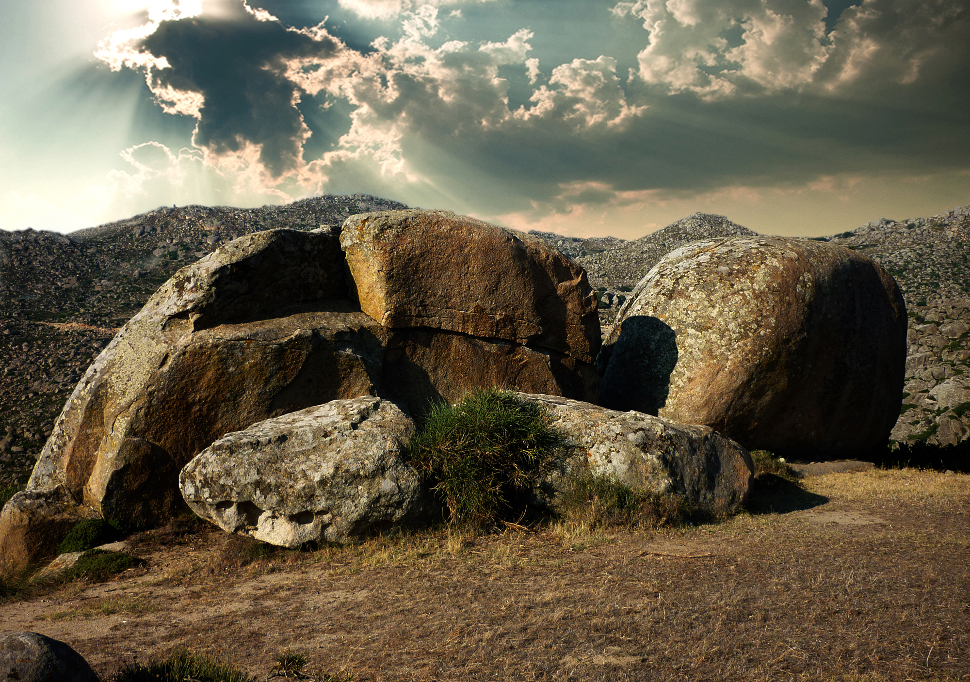 Bράχια στη περιοχή της Bωλάξ. Nήσος Tήνος, Eλλάδα.